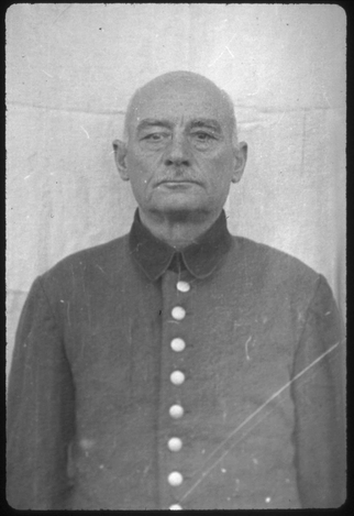 Johann Baptist Eichelsdörfer (* 20. Januar 1890; † 29. Mai 1946 in Landsberg am Lech) war als Hauptmann der Wehrmacht letzter Lagerführer des Außenlagers Kaufering IV des KZ Dachau, das sich bei Hurlach befand. Im Dachau-Hauptprozess wurde Eichelsdörfer zum Tode verurteilt und hingerichtet.